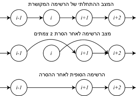 דוגמא של מניעה הדדית ברשימה מקושרת